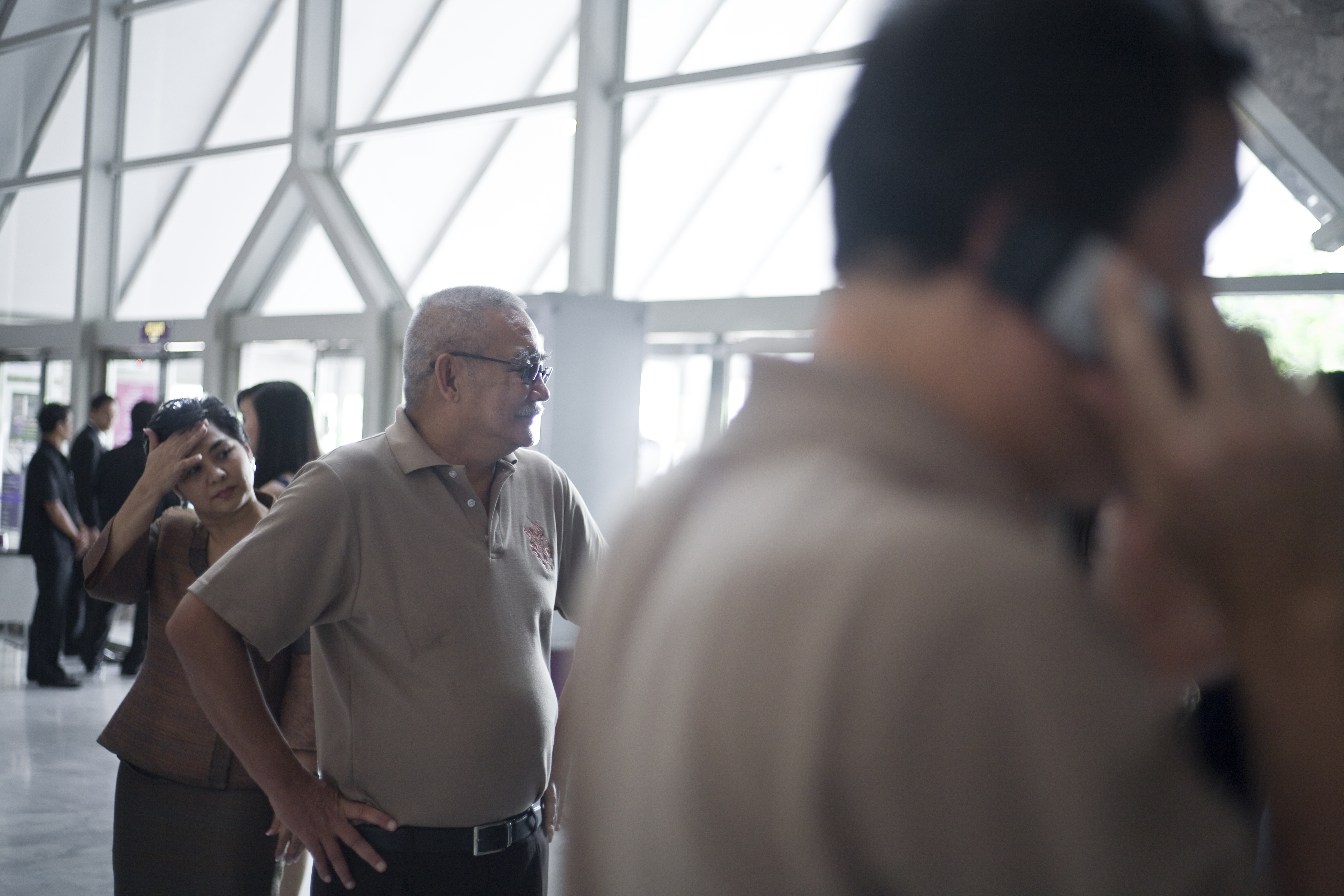 หม่อมเจ้าชาตรีเฉลิม ยุคล / นายกรัฐมนตรี แถลงข่าวรัฐบาลสนับสนุนการสร้างภายนตร์ตำนานสมเด็จพระนเรศวรมหาราช ภาค 3 และ 4 "สงครามยุทธหัตถี" ณ ศูนย์วัฒนธรรมแห่งประเทศไทย 8สิงหาคม2552 (The Official Site of The Prime Minister of Thailand Photo by พีรพัฒน์ วิมลรังครัตน์)